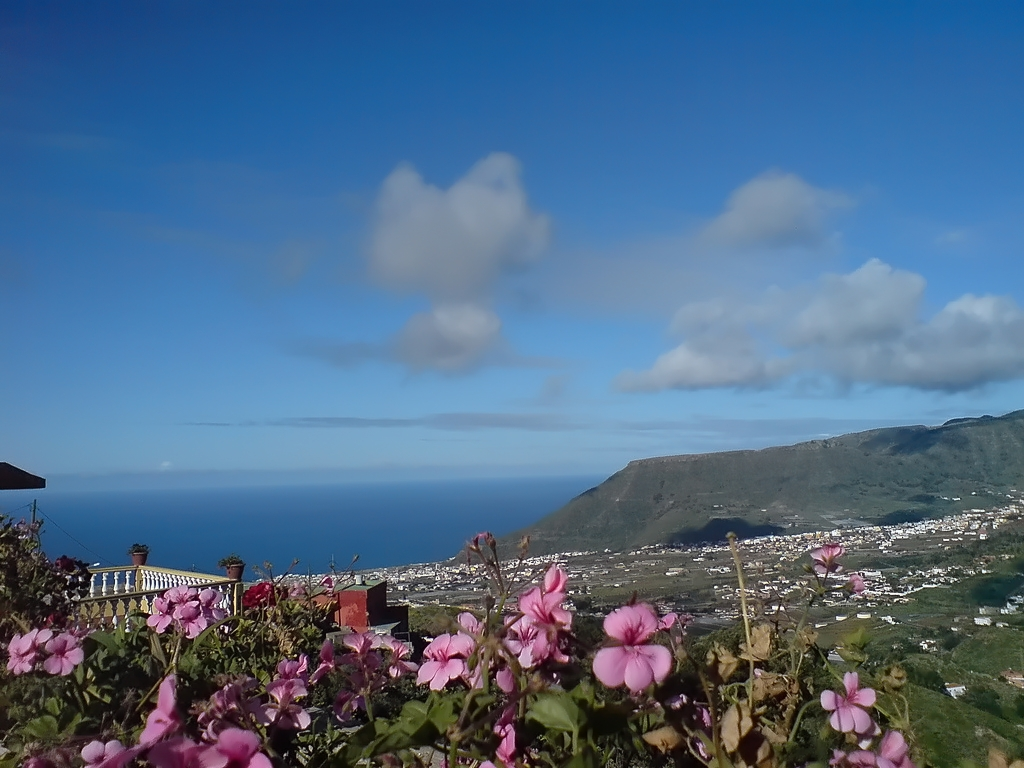 Vistas de Tegueste